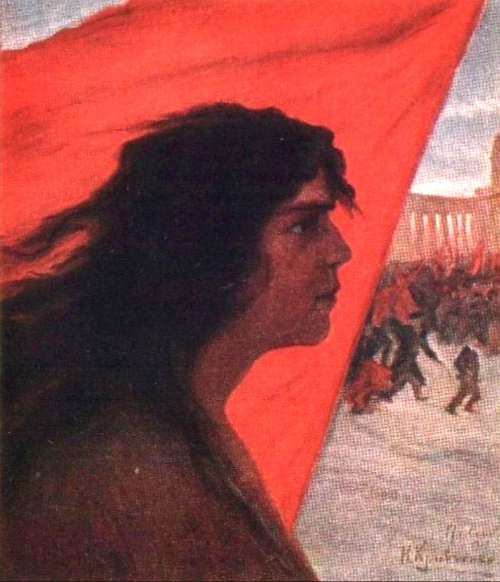 Н.Кравченко. Картина "Революция идет"